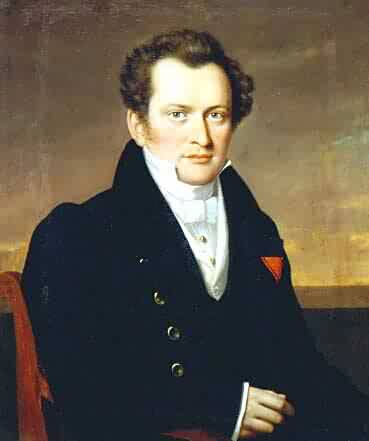 Партрэт Мікалая Радзівіла. Верагодна, Мікалай Мікалаевіч Радзівіл (1801-1853), сын Мікалая Радзівіла (1751-1810), муж 1. Вікторыі з Нарбутаў (?) і 2. Вікторыі з Вайцяхоўскіх, бацька Барбары, Мікалая Філіпа, Стэфаніі, Марыі і Ванды